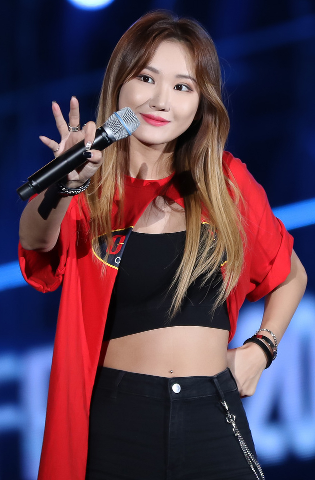 LE en Lotte Family Festival el 22 de octubre de 2016.